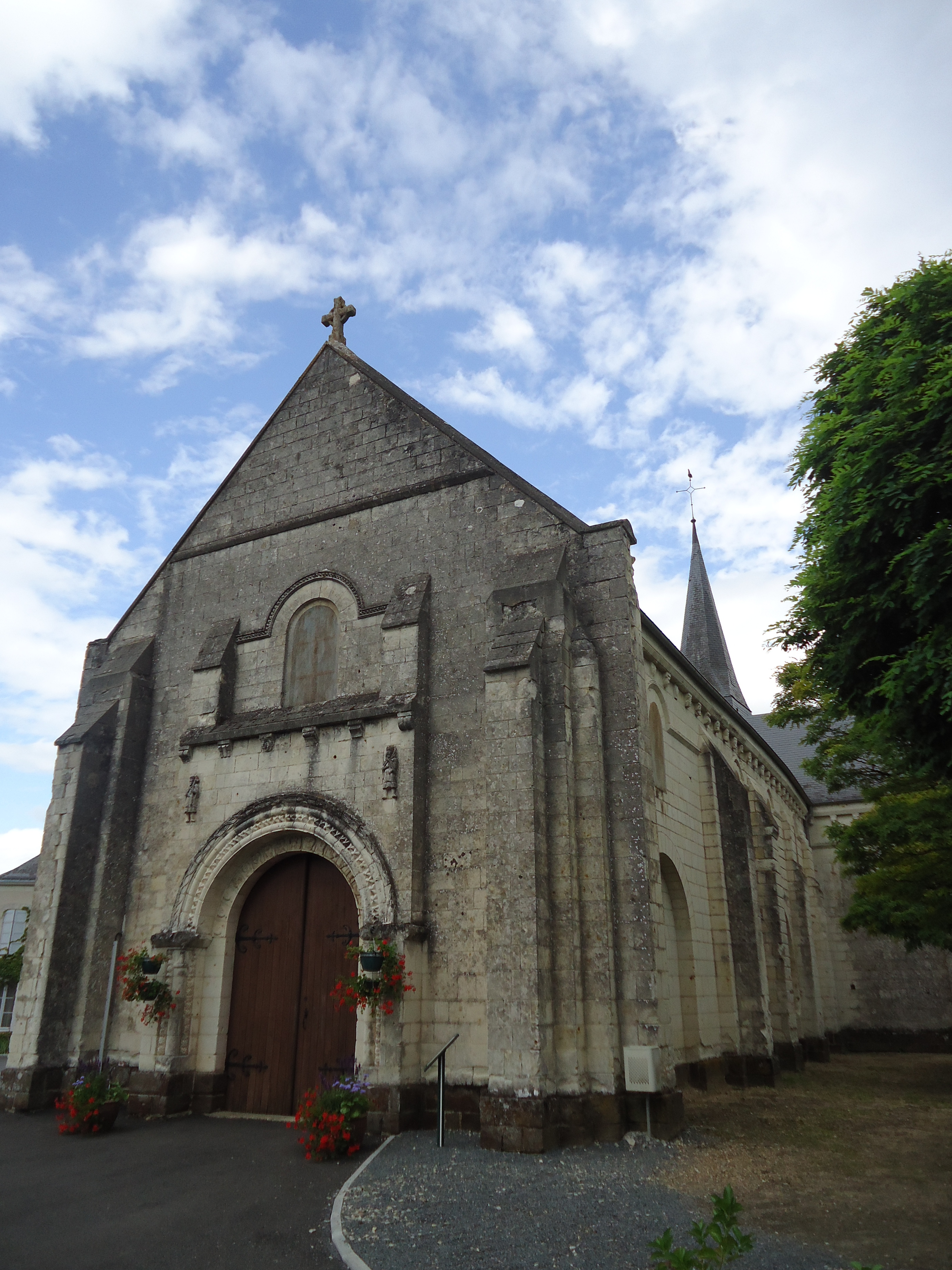 Eglise Saint-Lubin - Coulongé - Sarthe (72)